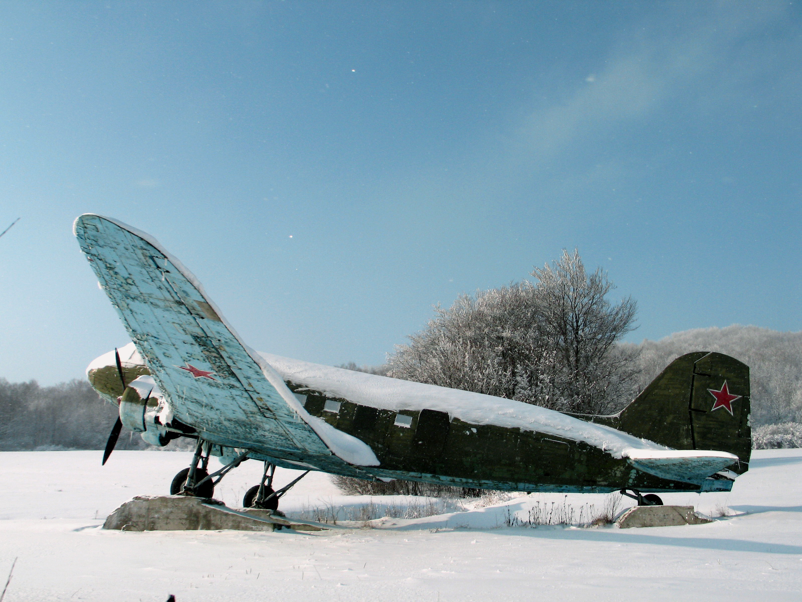 Vojenský exponát, sovietske lietadlo Lisunov Li-2 z obdobia Karpatsko-duklianskej operácie, na podstavci v chotári obce